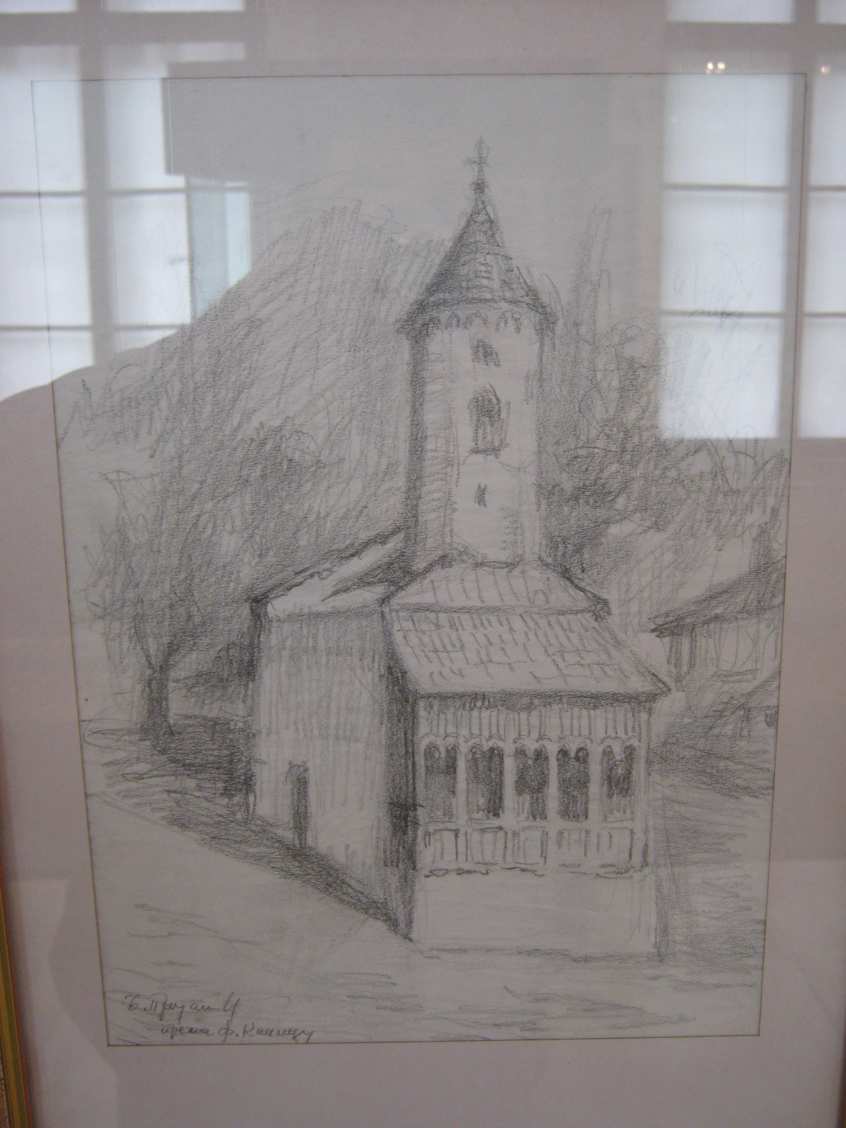 Музеј Другог српског устанка се налази у Такову и послује као део Музеја Рудничко-таковског краја. Музеј је смештен у згради старе таковске школе. У згради је смештена изложба предмета и докумената из Другог српског устанка.